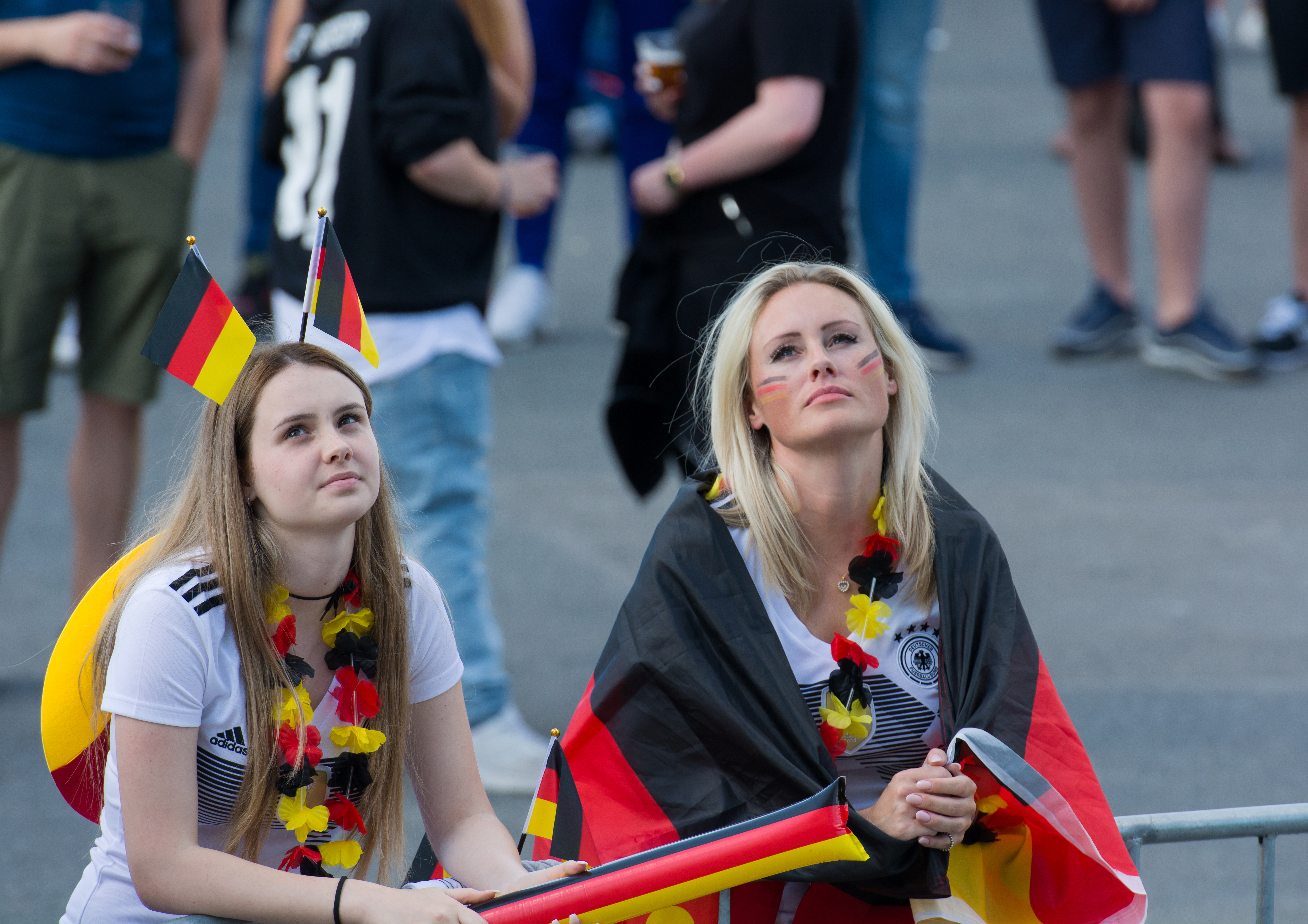 Impressionen vom Public Viewing Vorrundenspiel Südkorea - Deutschland auf dem Fan Park Hamburg